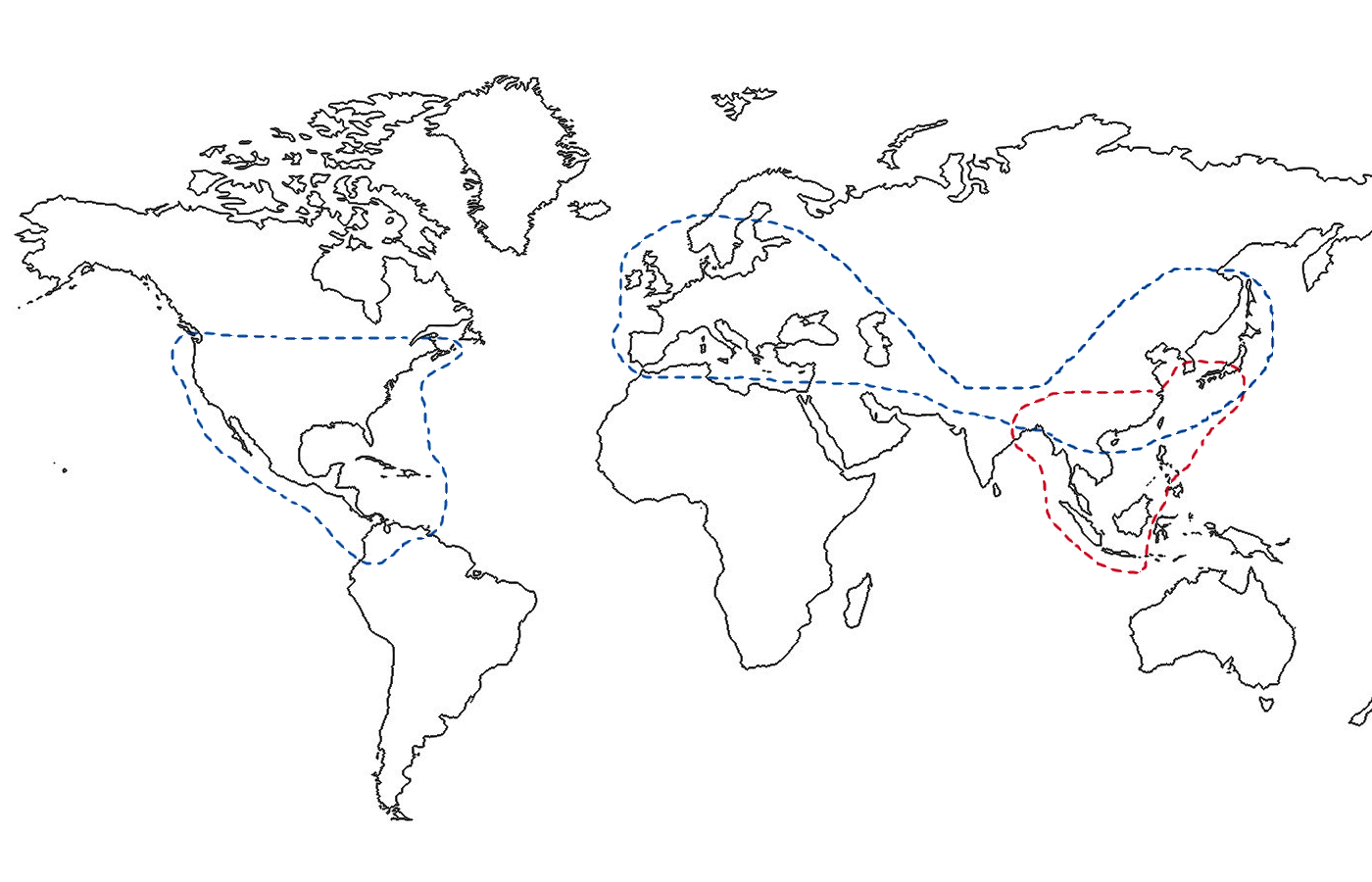 參考周浙昆，《中國櫟屬起源演化及其擴散》，雲南植物研究 1992；14：230繪製